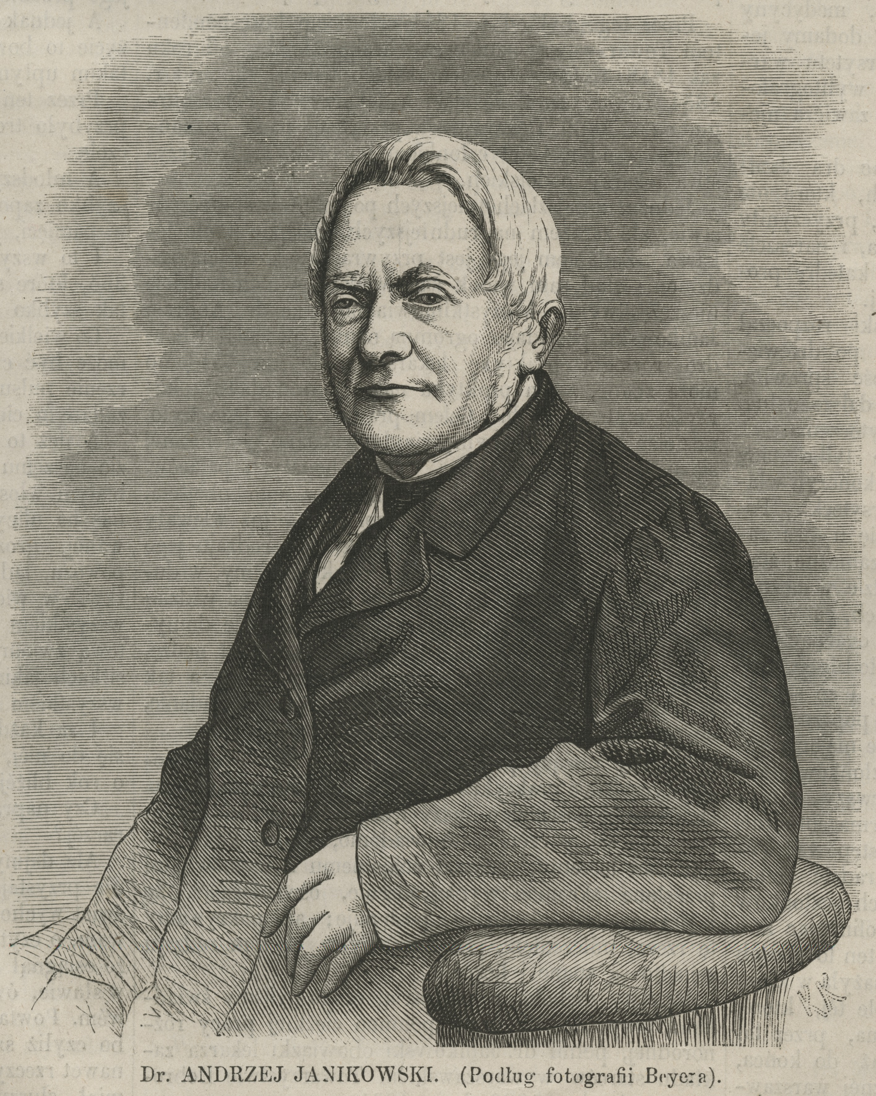 Dr. Andrzej Janikowski